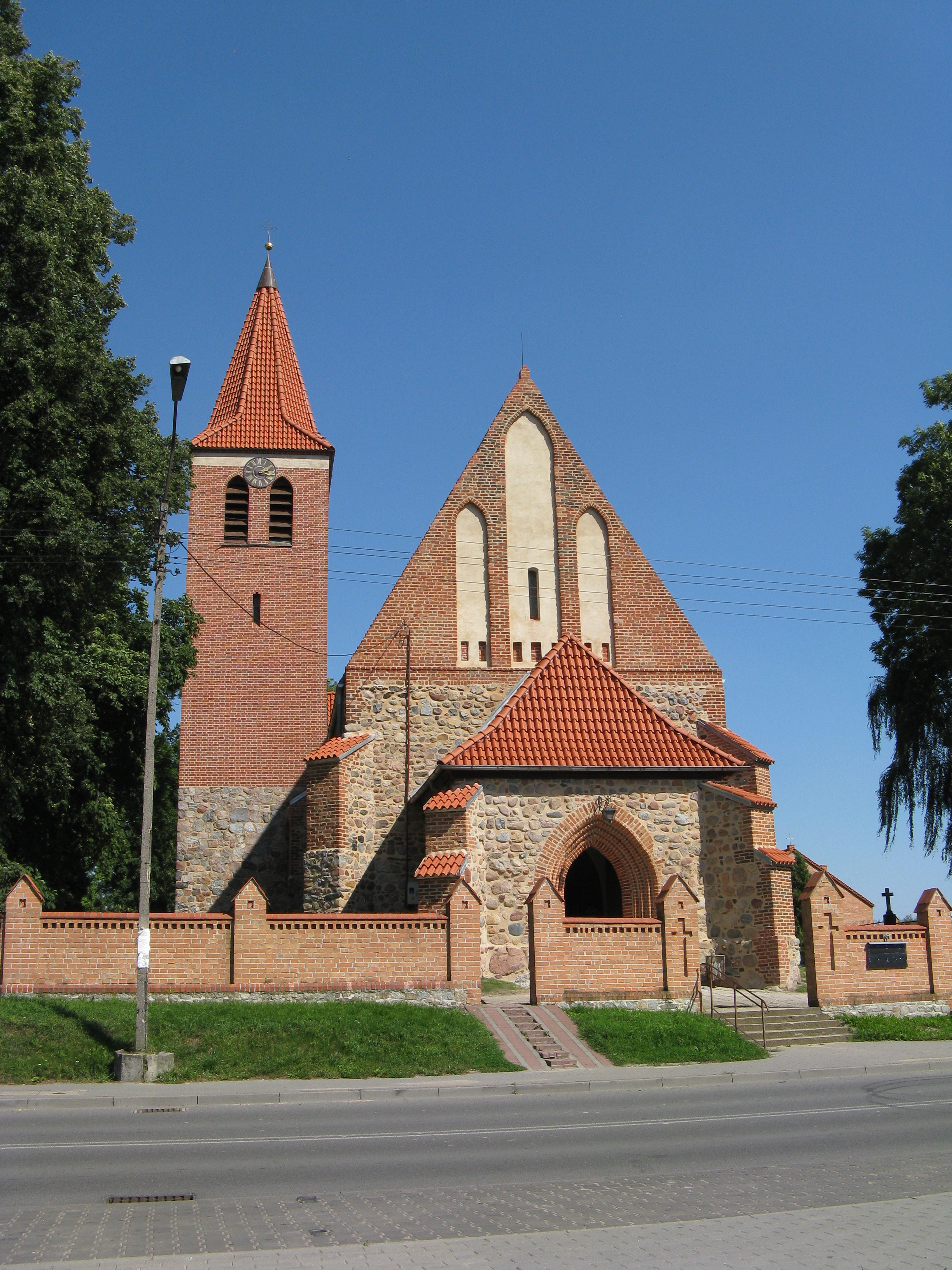 Church in Grzywna